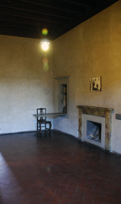 Certosa del Galluzzo, Florence, Italy. Monk's cell: room.